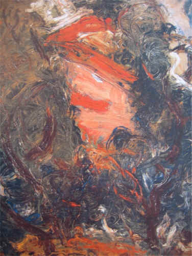 Mallorca